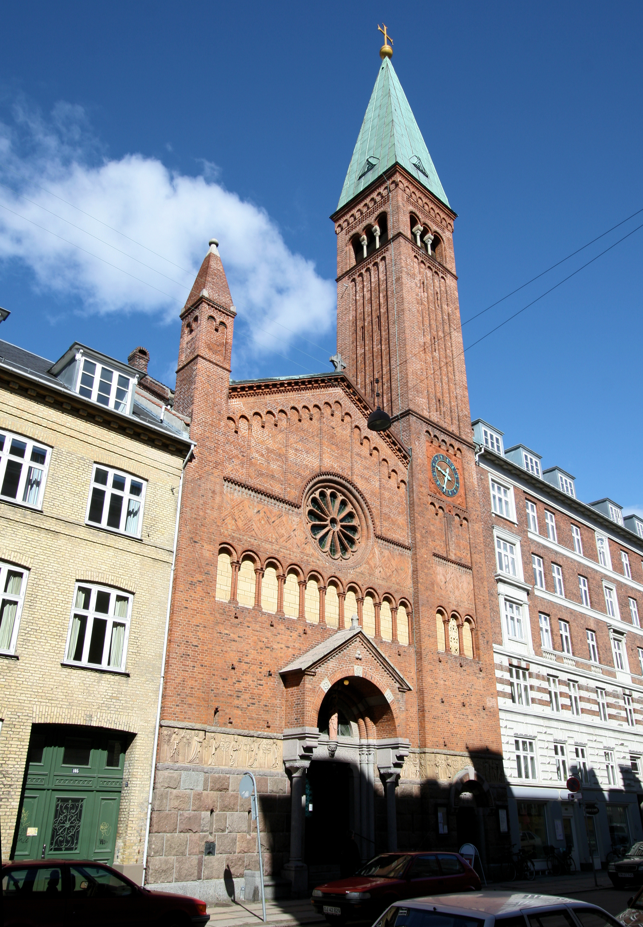 Nazaret Kirke, Østerbro, Denmark.